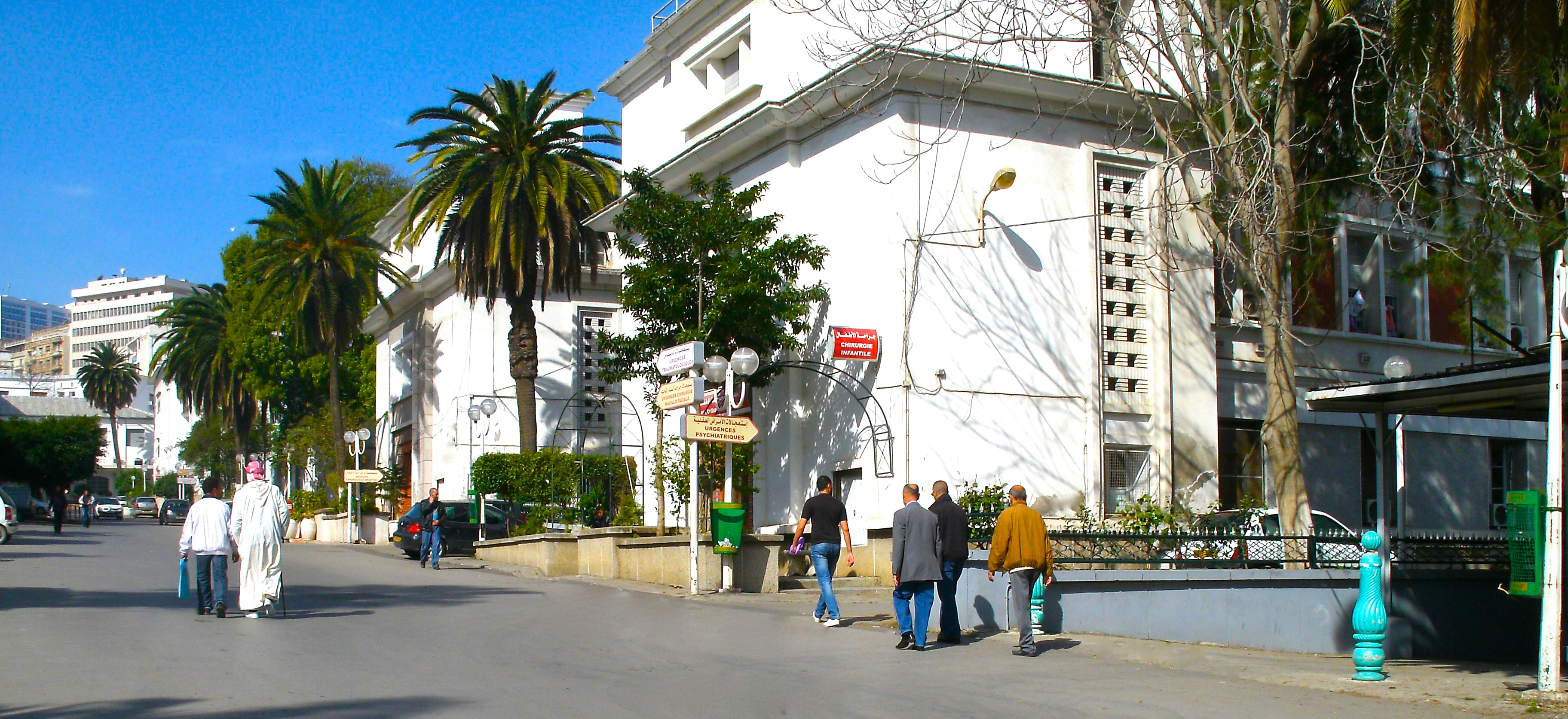 Hôpital Universitaire Mustapha Pacha à Alger